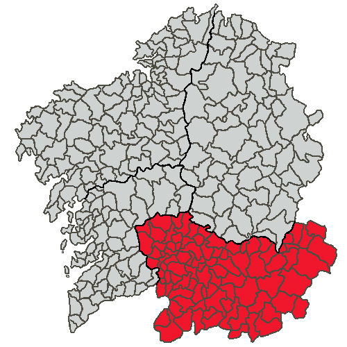 Mapa coa localización da Provincia de Ourense.